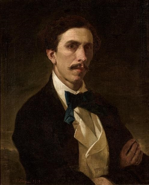 Retrato del pintor español Gumersindo Díaz (1841-1891), que nació en Oviedo y murió en Sevilla.